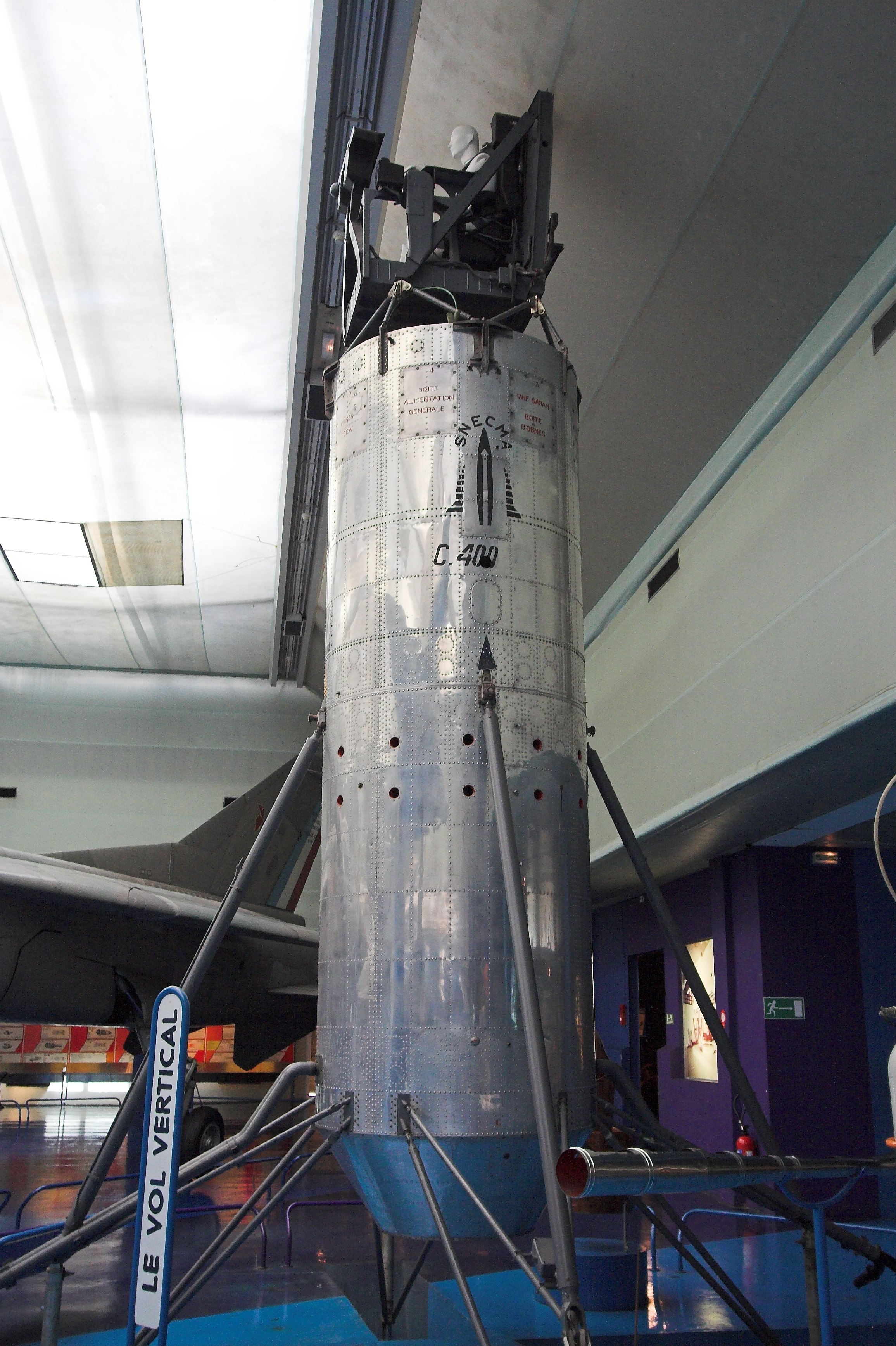 French experimental aircraft SNECMA C.400P2 "Atar volant"(Musée de l'air et de l'espace, Le Bourget, France)